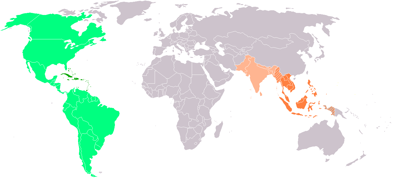 Mapa de las Indias Occidentales y Orientales según conceptos de los siglos XVI al XIX.